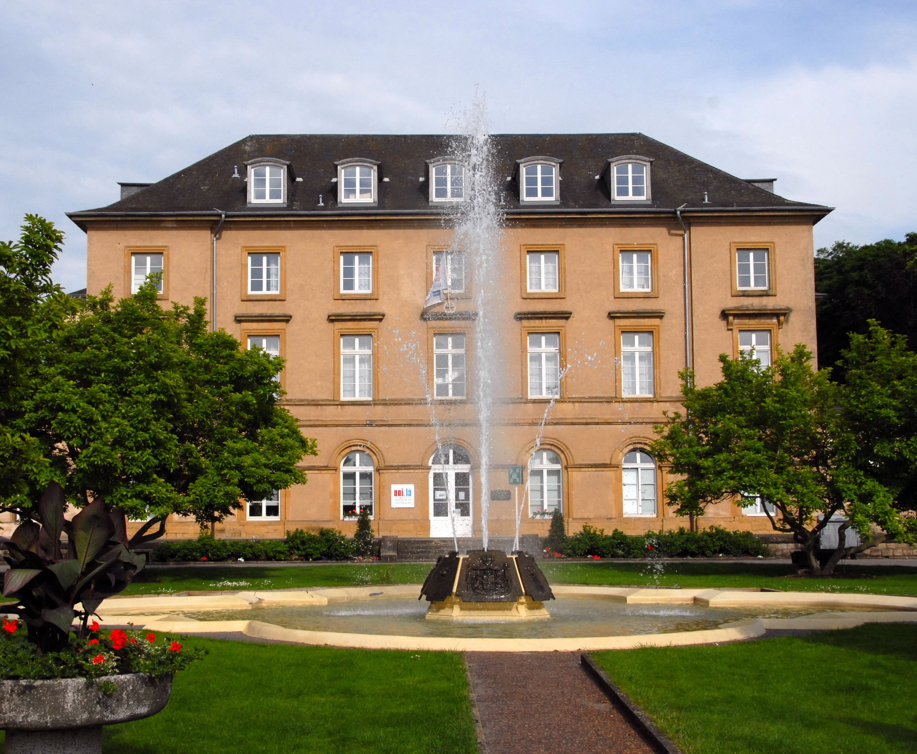 Université du Luxembourg, Walfer.